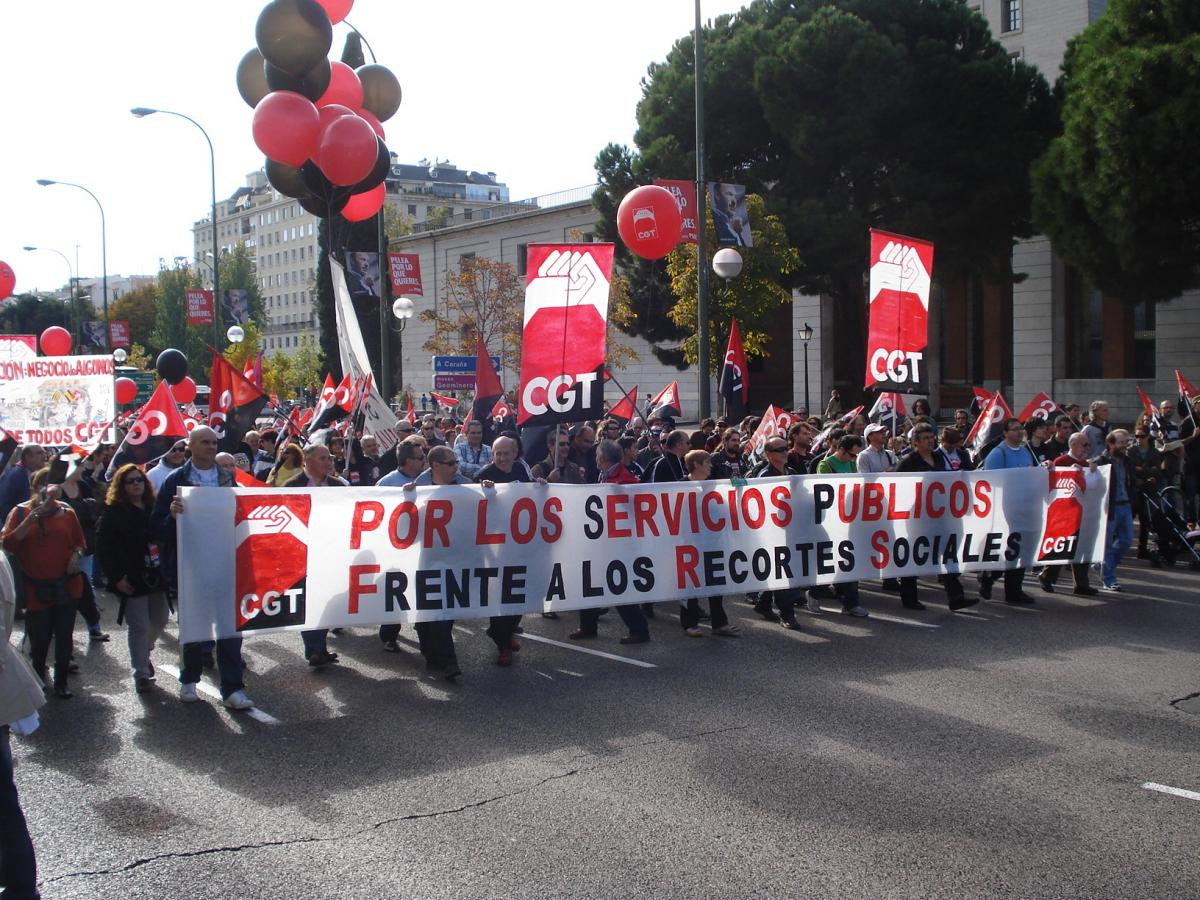 500px provided description: Por Los Servicios Públicos 12 Nov